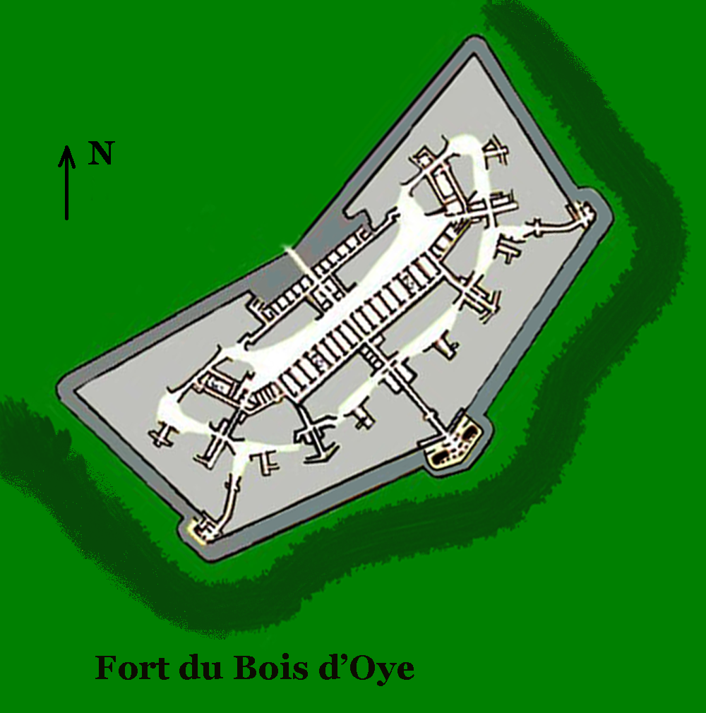 Paln des Fort du Bois d'Oye bei Belfort